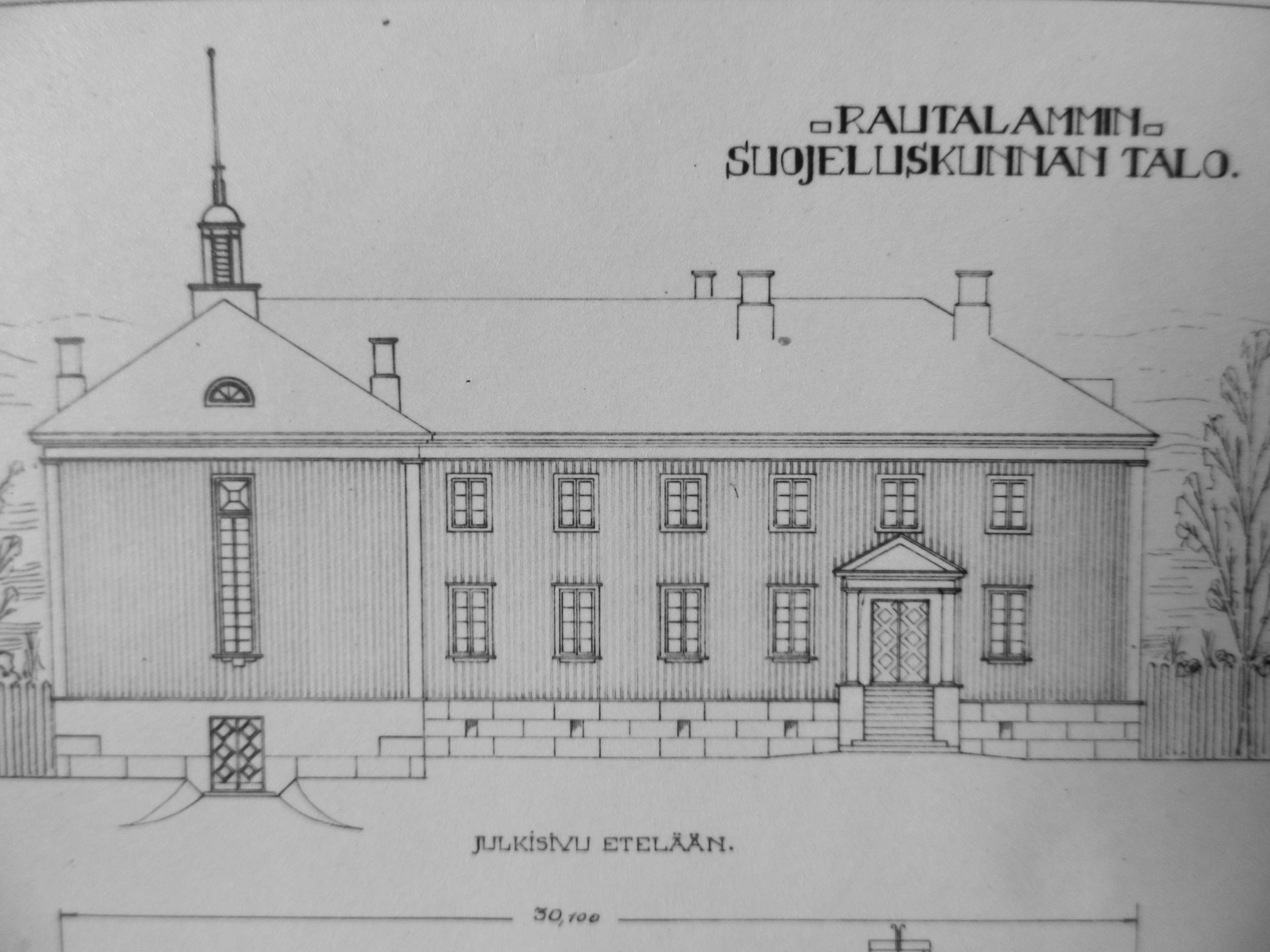 A. Koposen julkisivupiirustus Rautalammin suojeluskuntatalosta